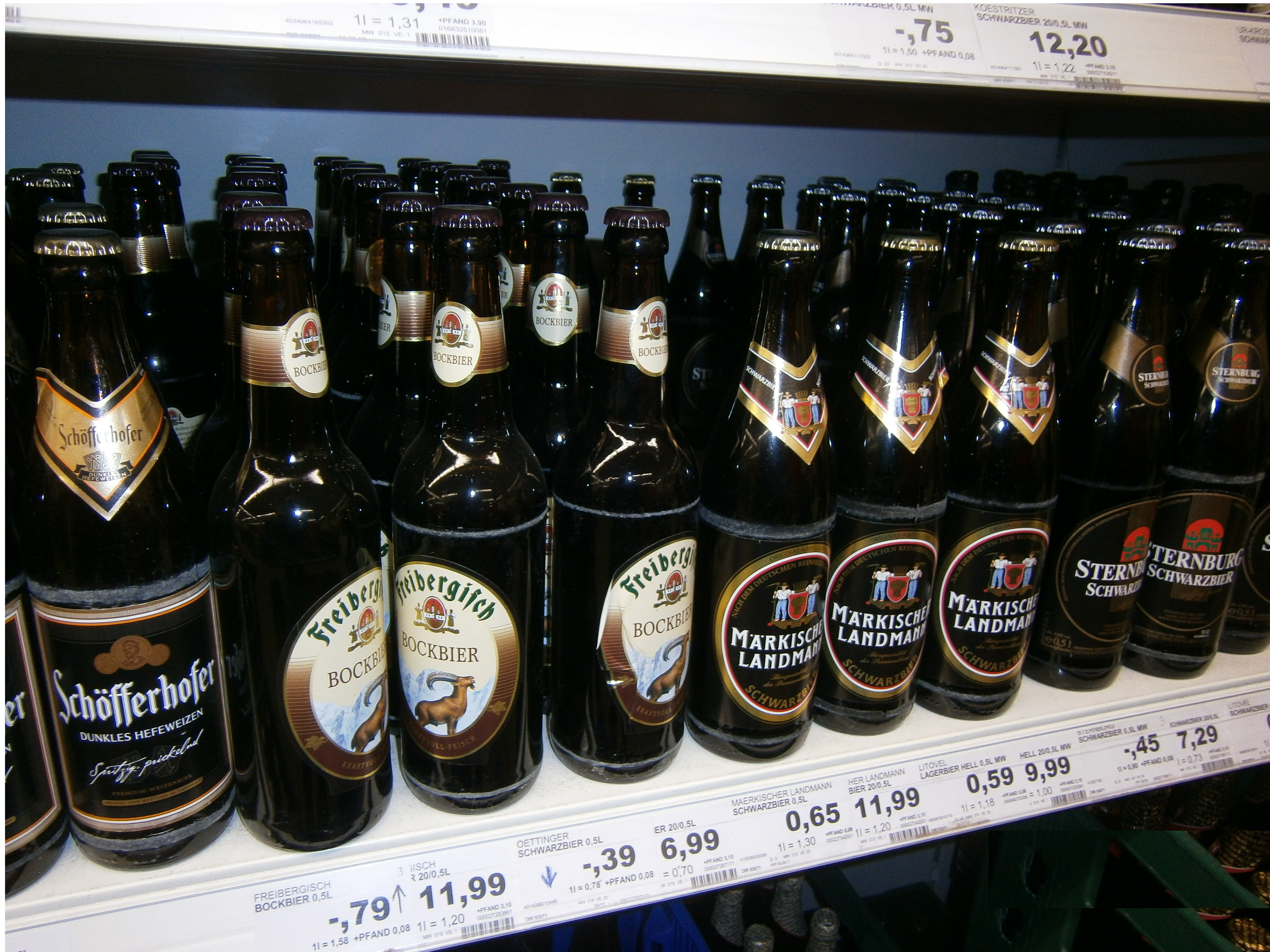 Verschiedene Dunkle Biere in der Kaufhalle. Dunkles Hefeweizen von Schöfferhofer. Freibergisch Bockbier dunkel. Schwarzbier Märkischer Landmann der Berliner Kindl Brauerei. Schwarzbier der Sternburger Brauerei Leipzig.